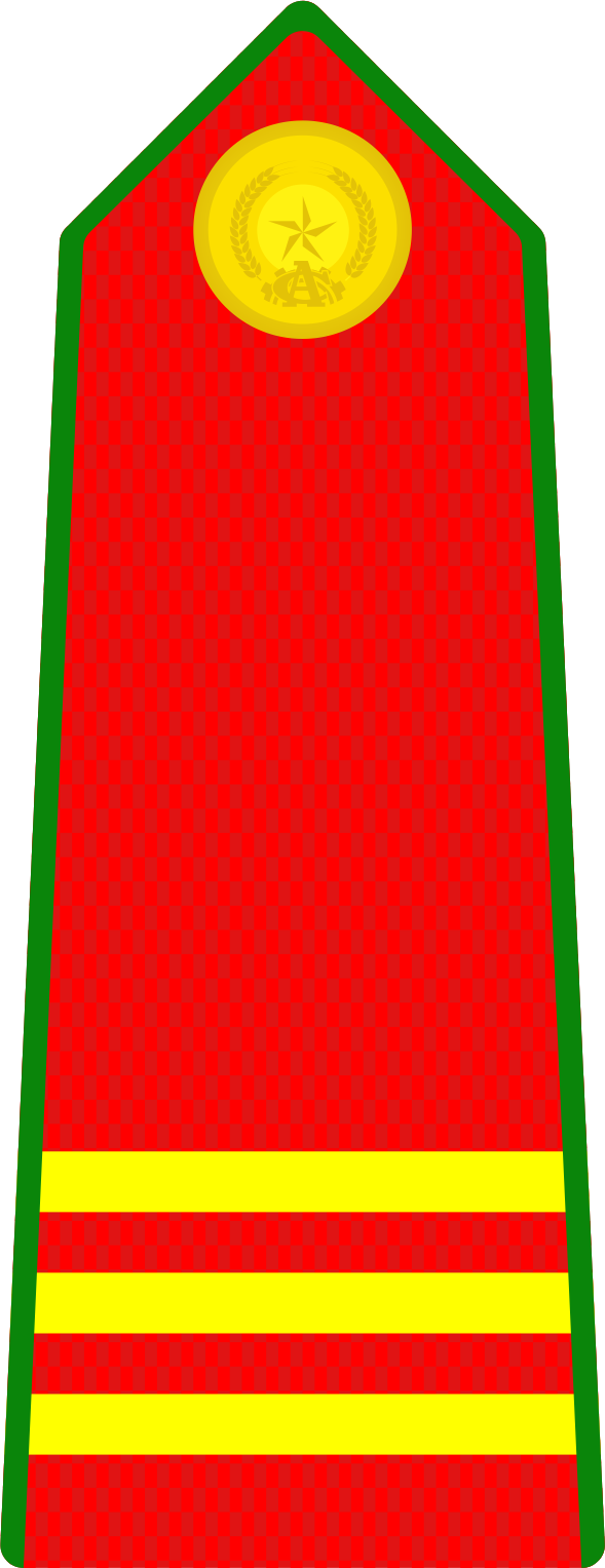 Cấp hiệu Thượng sĩ Công an